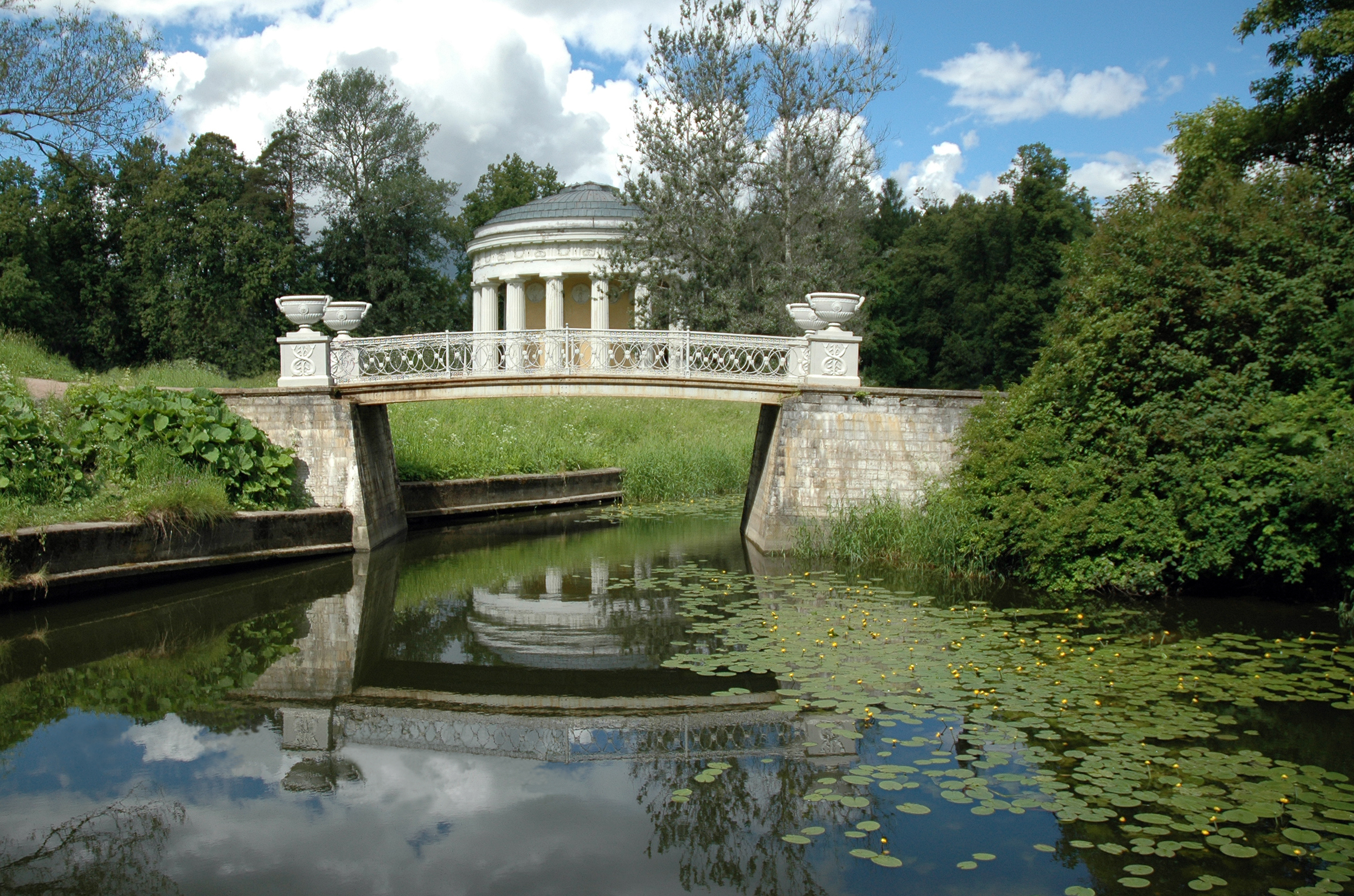 Мост Чугунный у Храма дружбы (Санкт-Петербург и Лен.область, Павловск, долина р. Славянки)